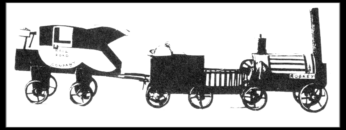 Modell der Rocket, das Goethe von englischen Freunden für seine Enkel geschenkt bekam. Inzwischen, bis heute (2006), jedoch unauffindbar verschwunden. Foto: Stiftung Deutsches Technikmuseum, Sammlung Feldhaus.